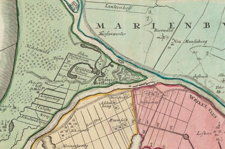 Gdańska Głowa około 1730 r.